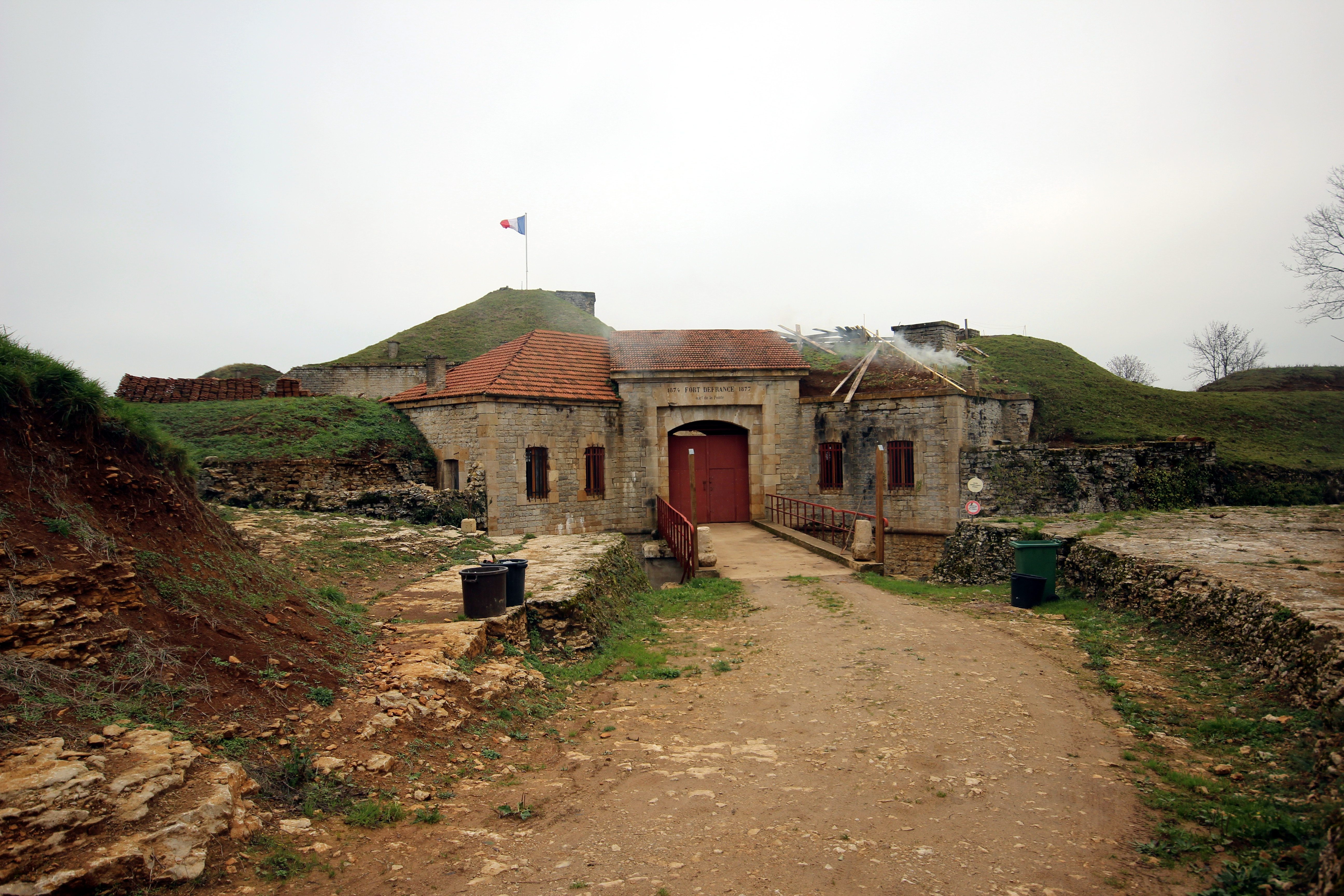 L'entrée du fort de la Pointe de Diamant